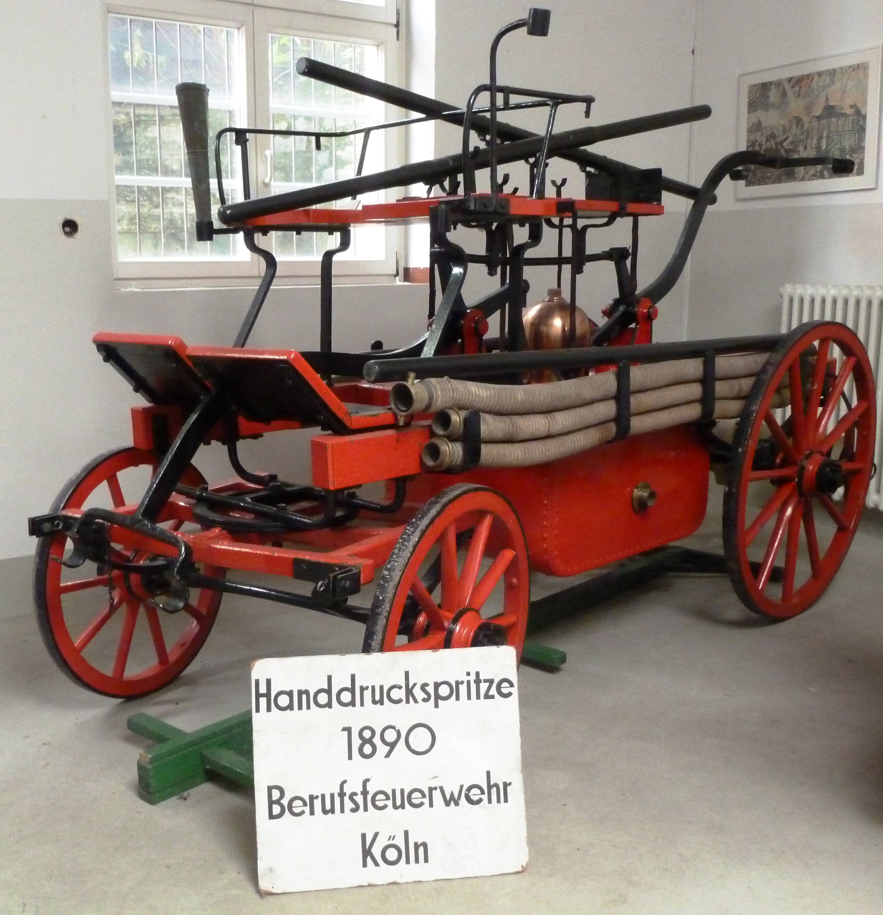 Historische Lehrsammlung der Berufsfeuerwehr Köln: Handdruckspritze aus dem Jahr 1890